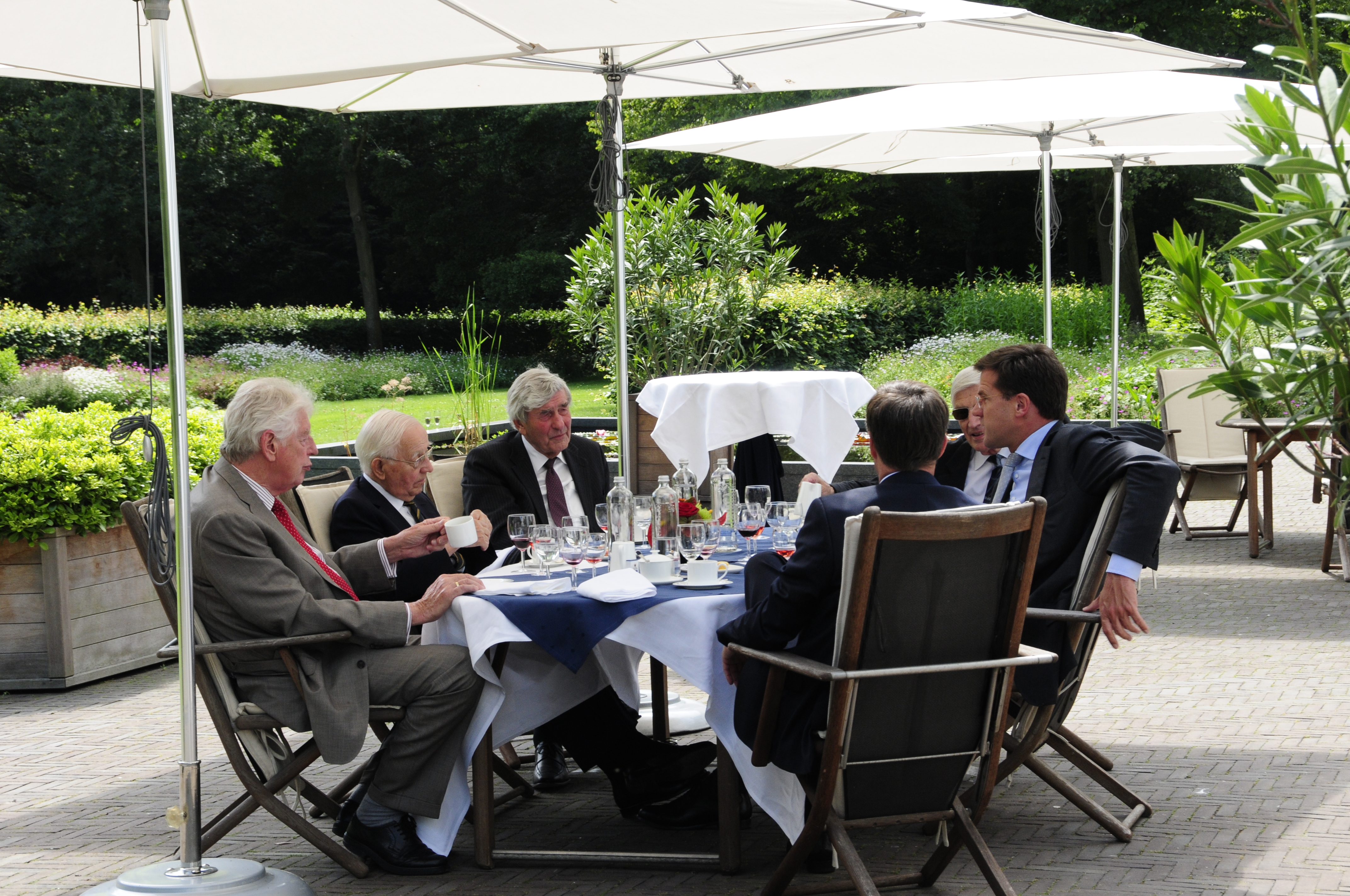 Oud ministers-presidenten Wim Kok, Piet de Jong, Ruud Lubbers, Jan Peter Balkenende, Mark Rutte en Dries van Agt